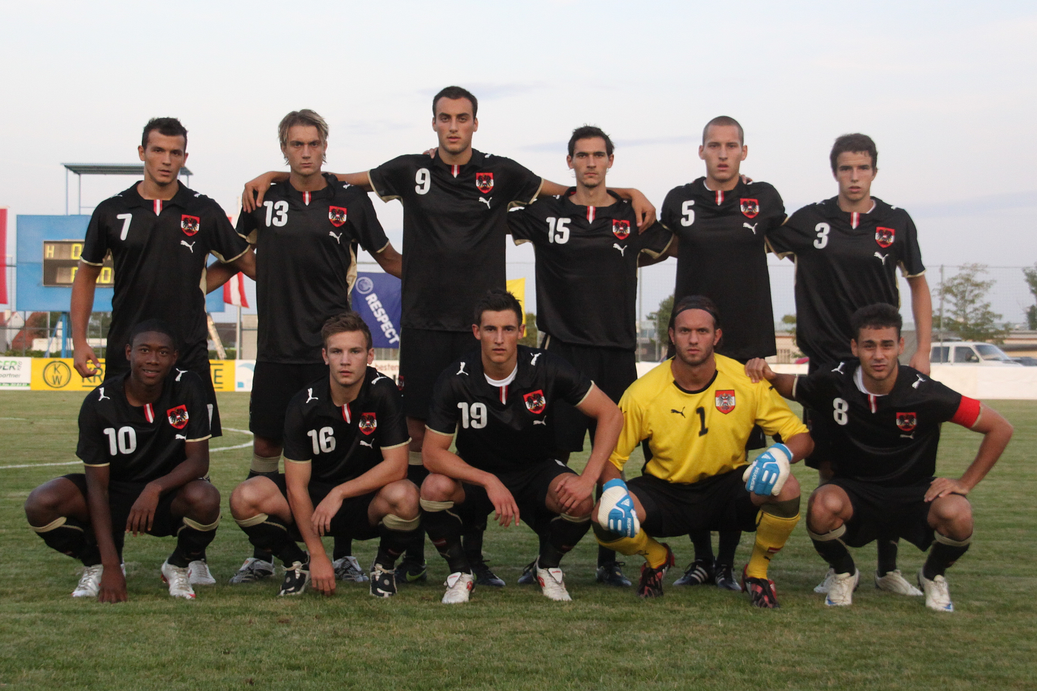 Die österreichische U-21-Fußballnationalmannschaf vor dem Spiel gegen albanische U-21-Fußballnationalmannschaft (3:1)1. Reihe: David Alaba, Andreas Weimann, Thomas Piermayr, Wolfgang Schober, Veli Kavlak (von links nach rechts)2. Reihe: Haris Bukva, Stefan Ilsanker, Atdhe Nuhiu, Manuel Wallner, Christian Ramsebner, Fabian Koch (von links nach rechts)